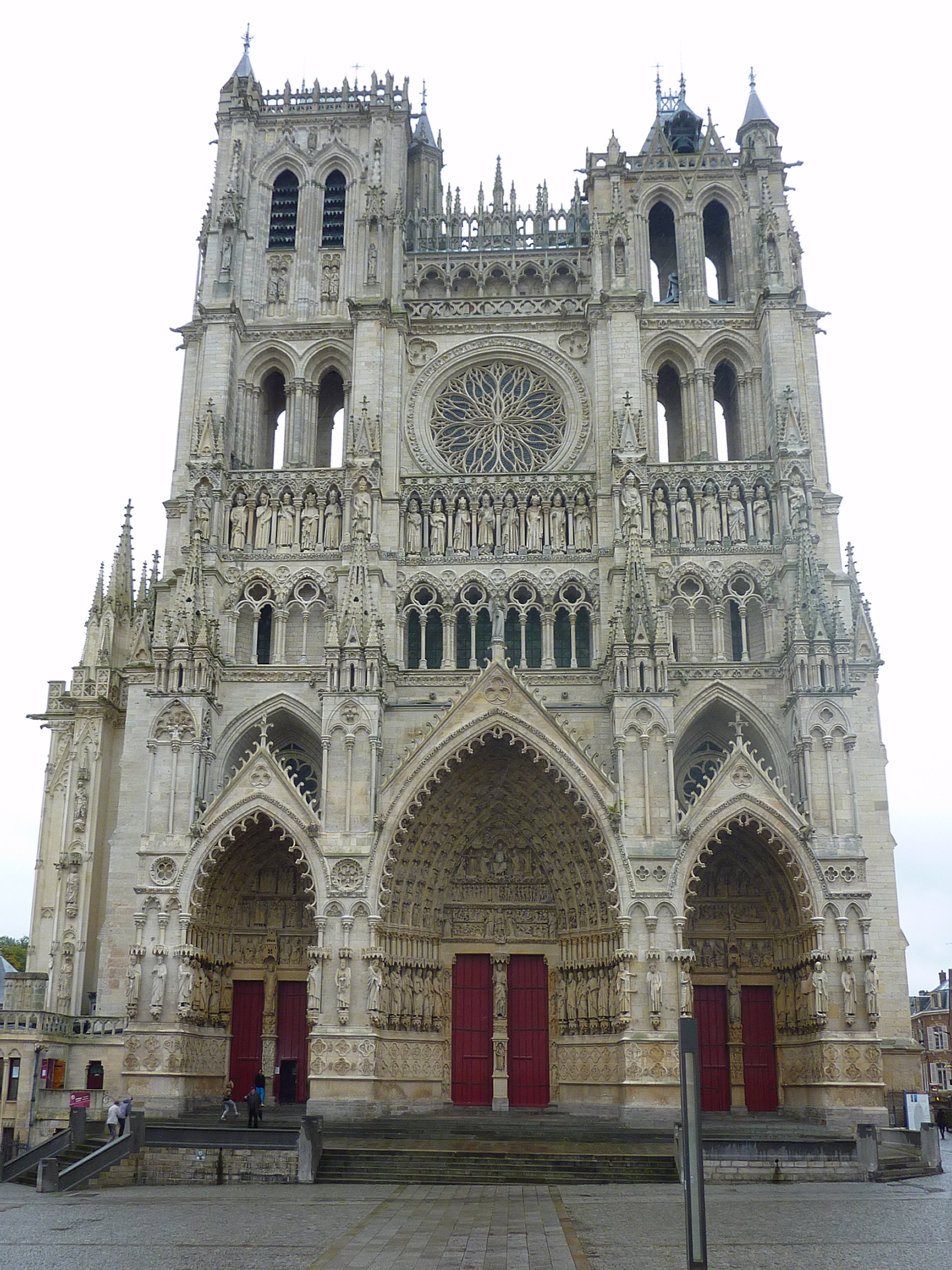 Cathédrale Notre-Dame Amiens Somme France